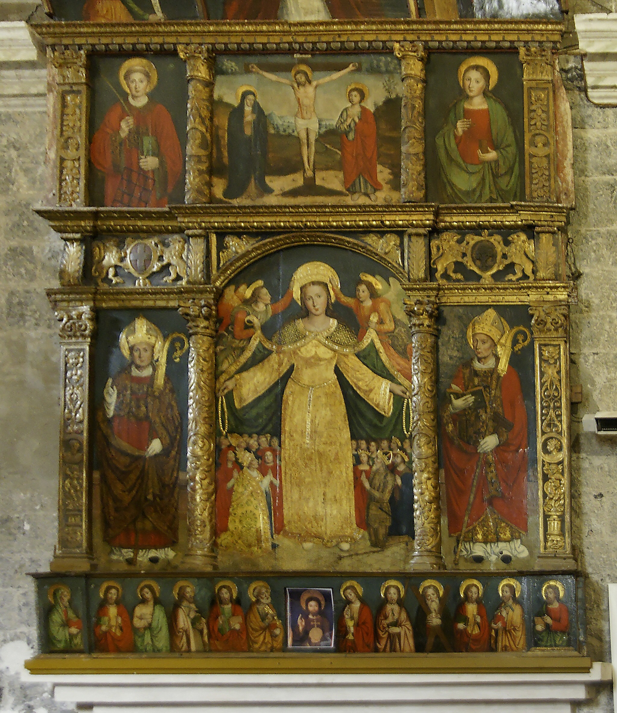 Eglise St-Martin - Retable de la Vierge de Miséricorde par Francesco Brea (1555)